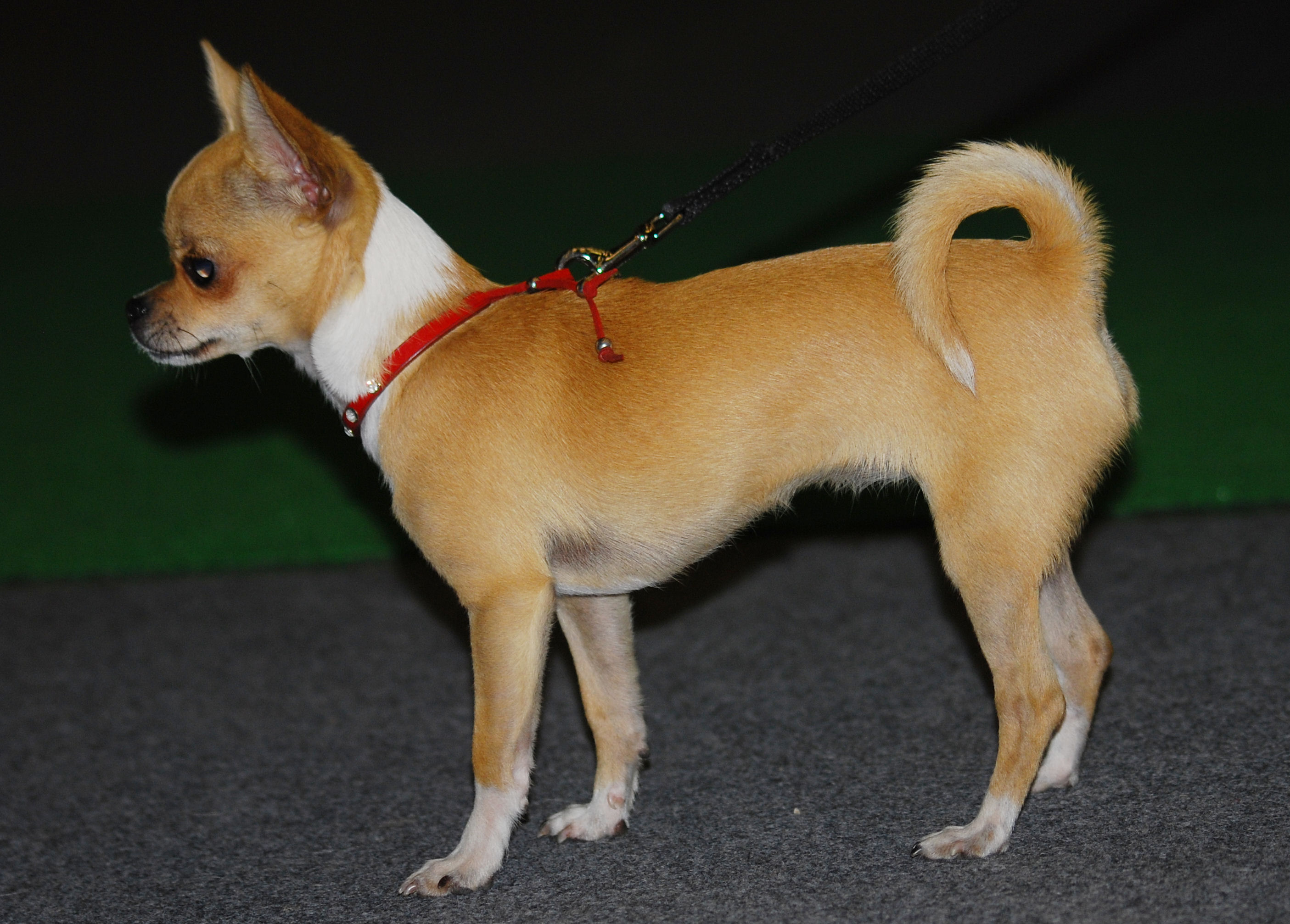 Chihuahua, XI International Dog Show in Kraków